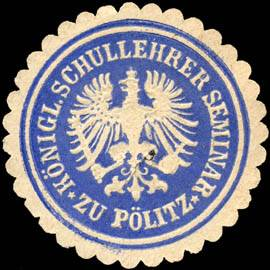 Sealing stamp Title: Königliche Schullehrer Seminar zu Pölitz Description: blau, weiß, geprägt Place: Pölitz size: 3 cm